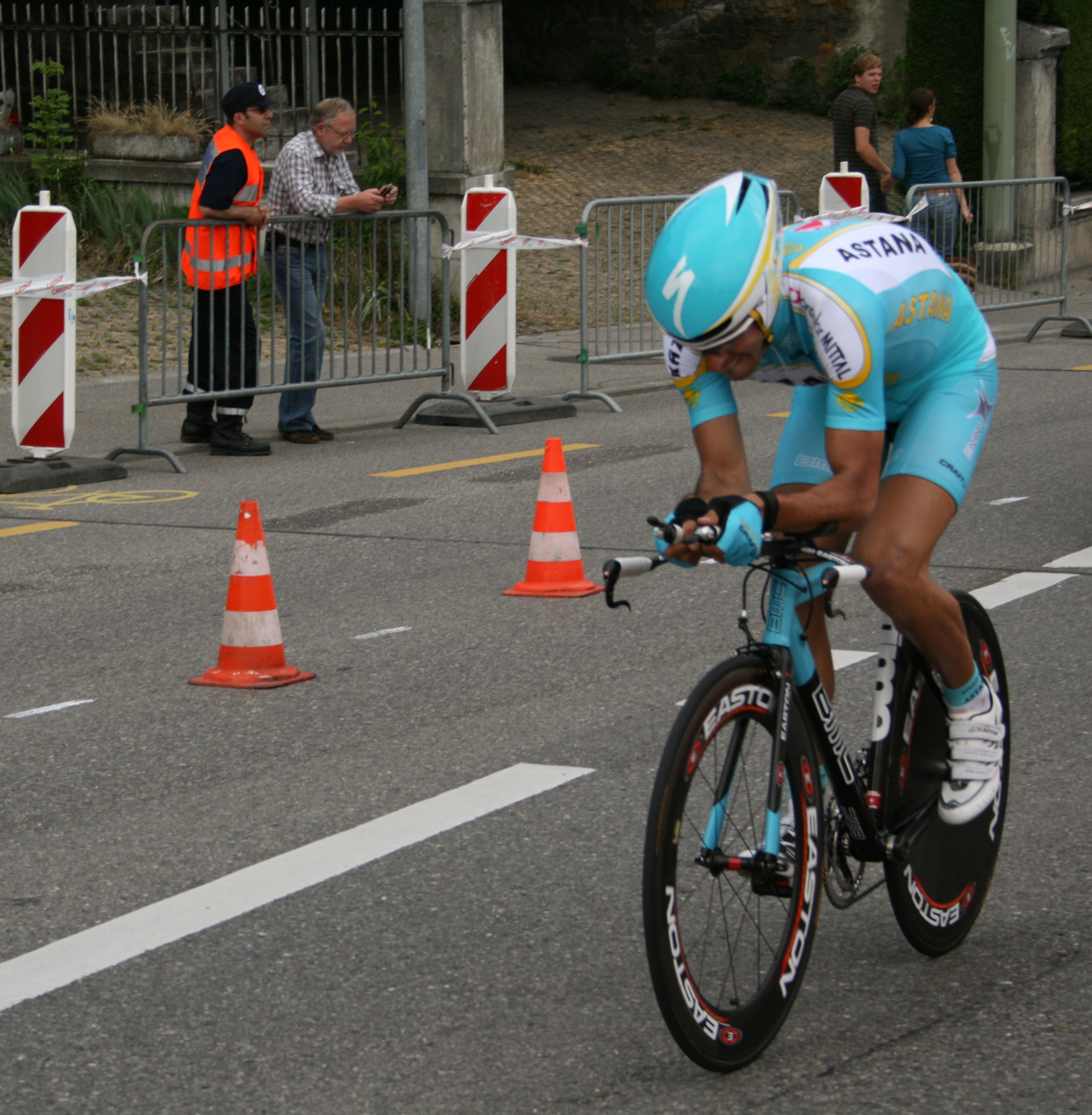 Antonio Colom prologue du Tour de Romandie 2007